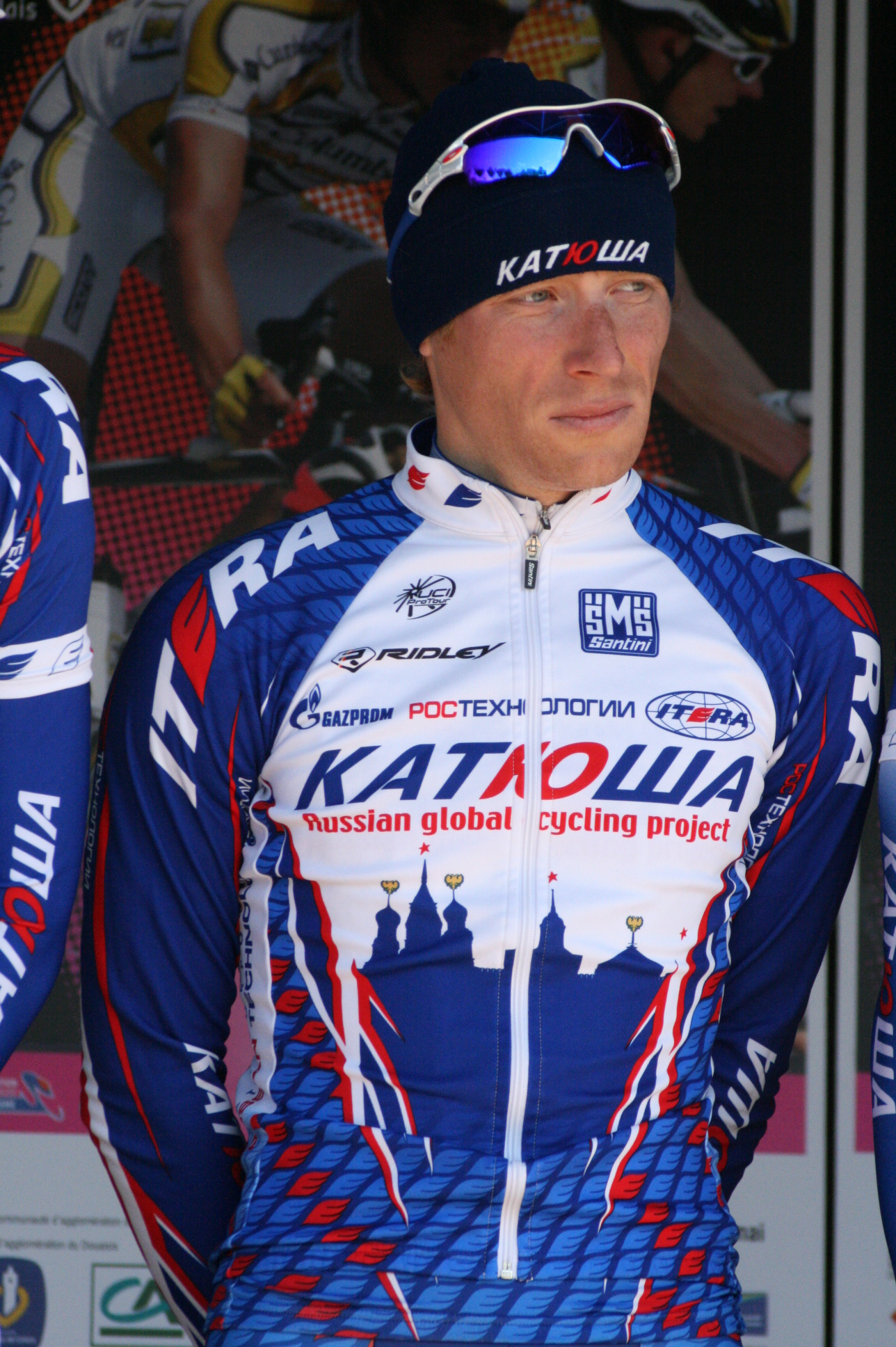 Pavel Brutt lors de la présentation des équipes des 4 jours de Dunkerque